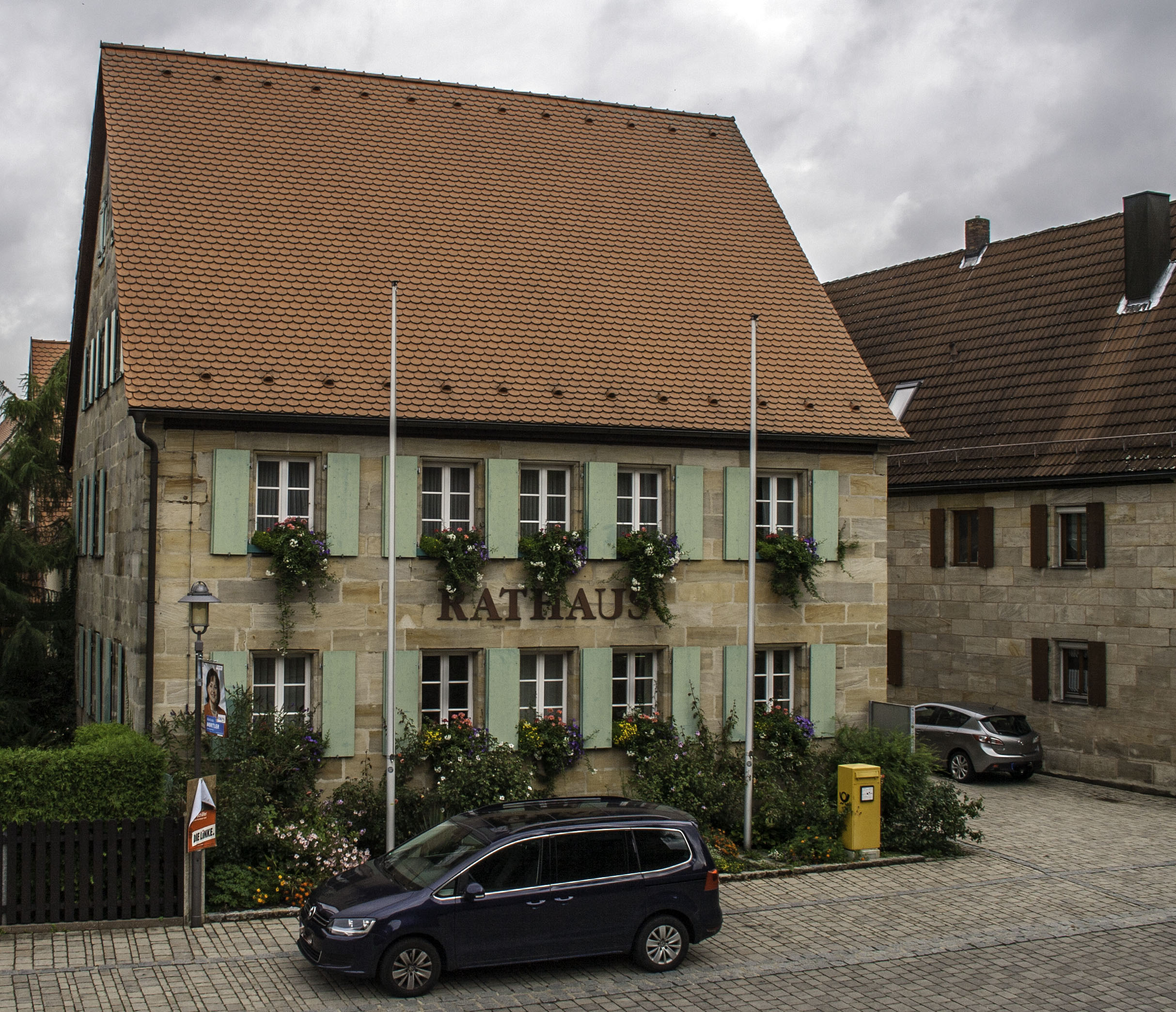 Rathhaus Ottensoos